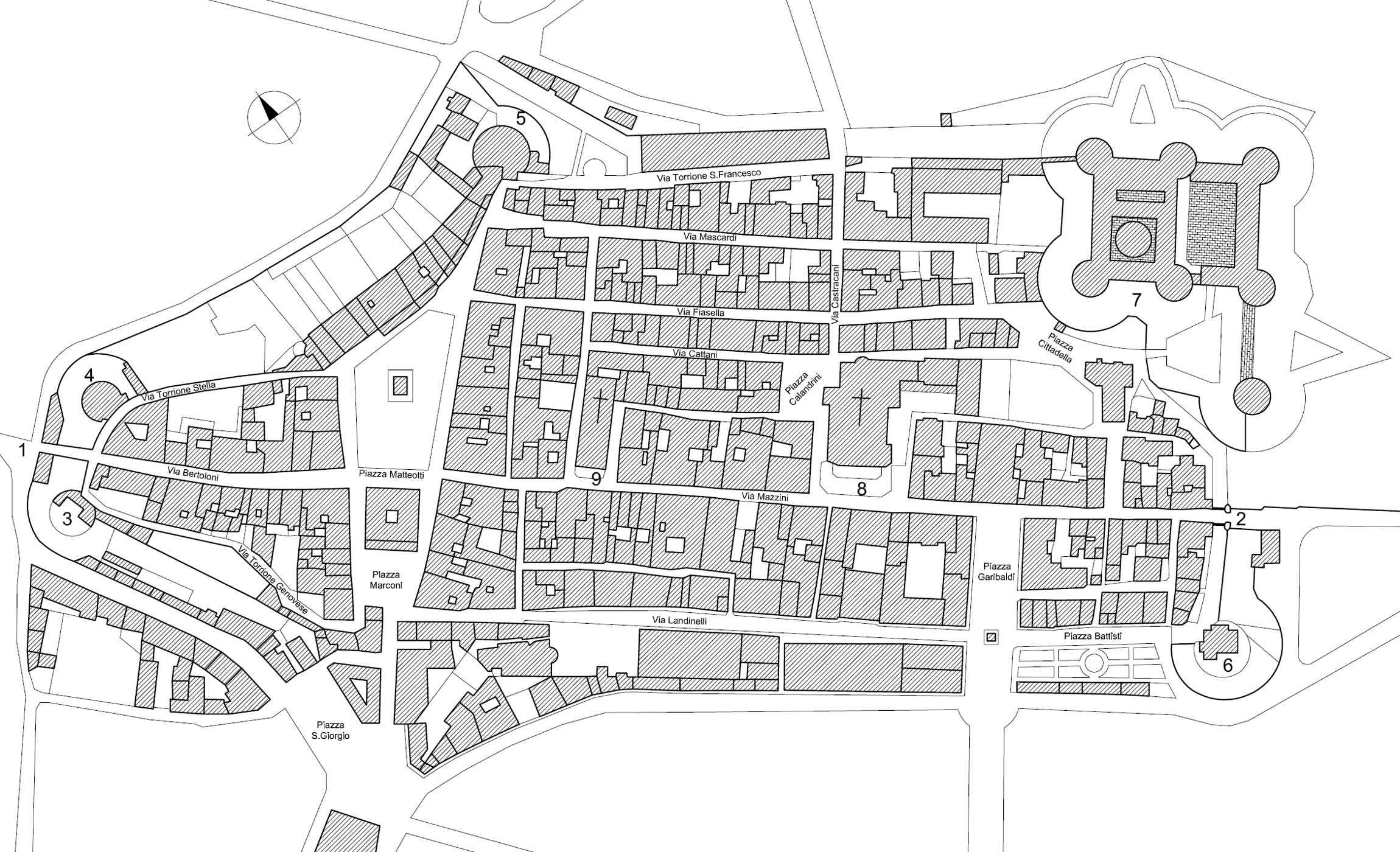 Schema grafico del centro storico della città di Sarzana